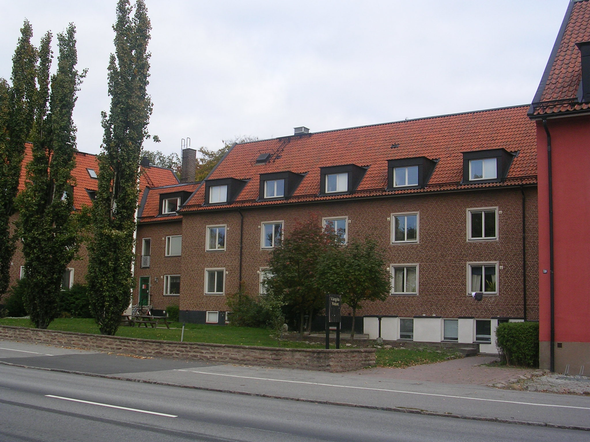 Västgöta nation , Lund Author: Väsk Date: October 2005